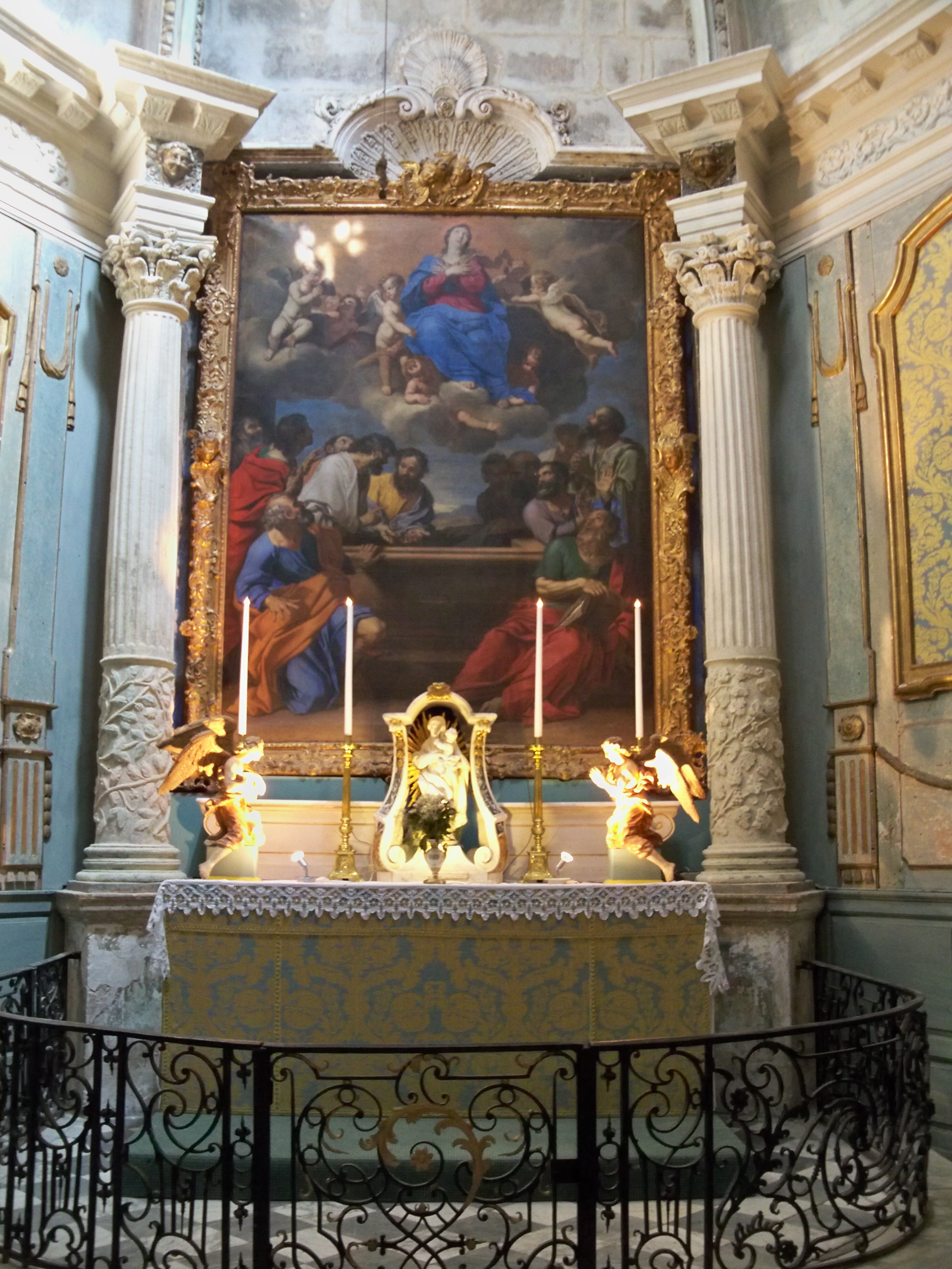 Collégiale royale Sainte Marthe de Tarascon (13)